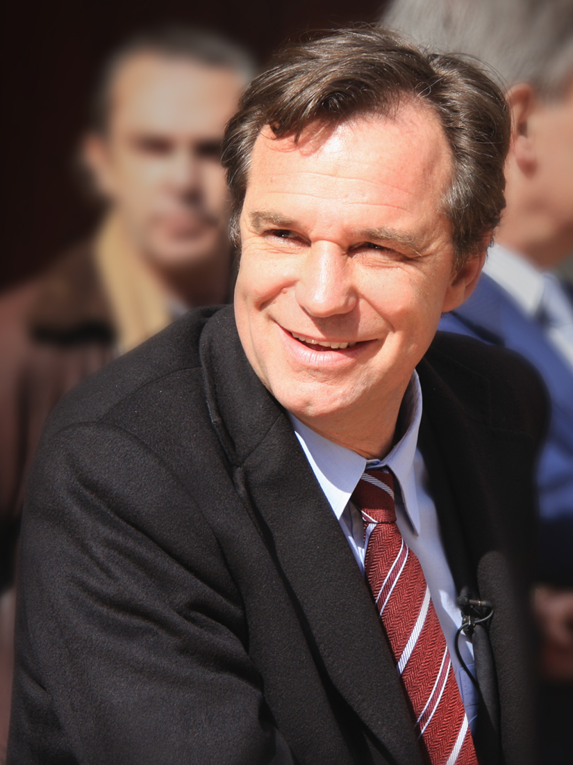 Renaud MUSELIER à la rencontre des marseillais en 2010